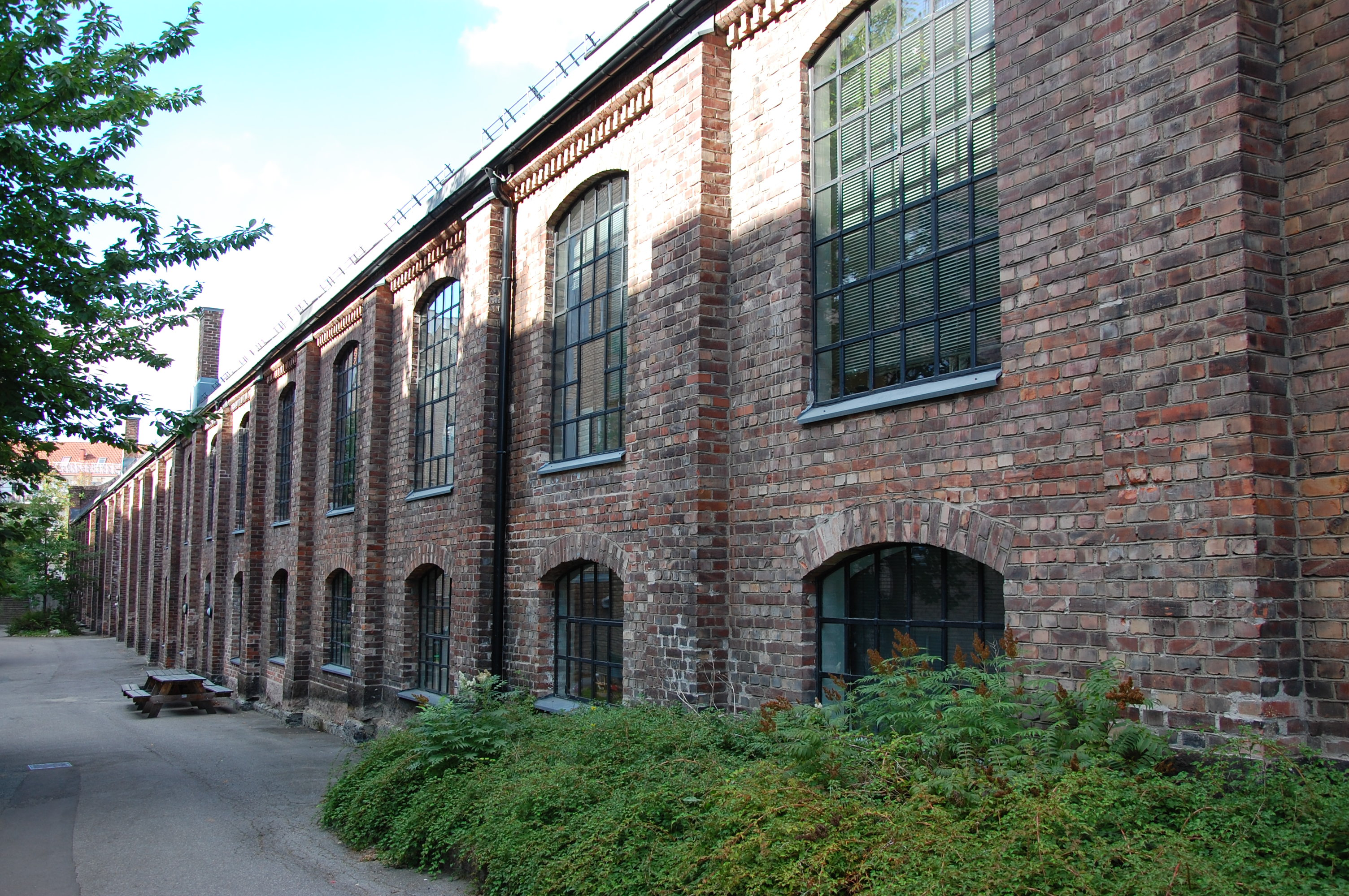 Sagene vognhall og verksted, sporveisanlegg, Pontoppidans gate 7 i Oslo, Sagene vognhall 1 og 2 (1913-14), vognhall/lokomotivstall